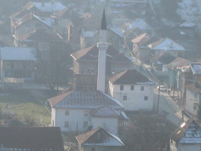 Dzamija u centru Brodareva